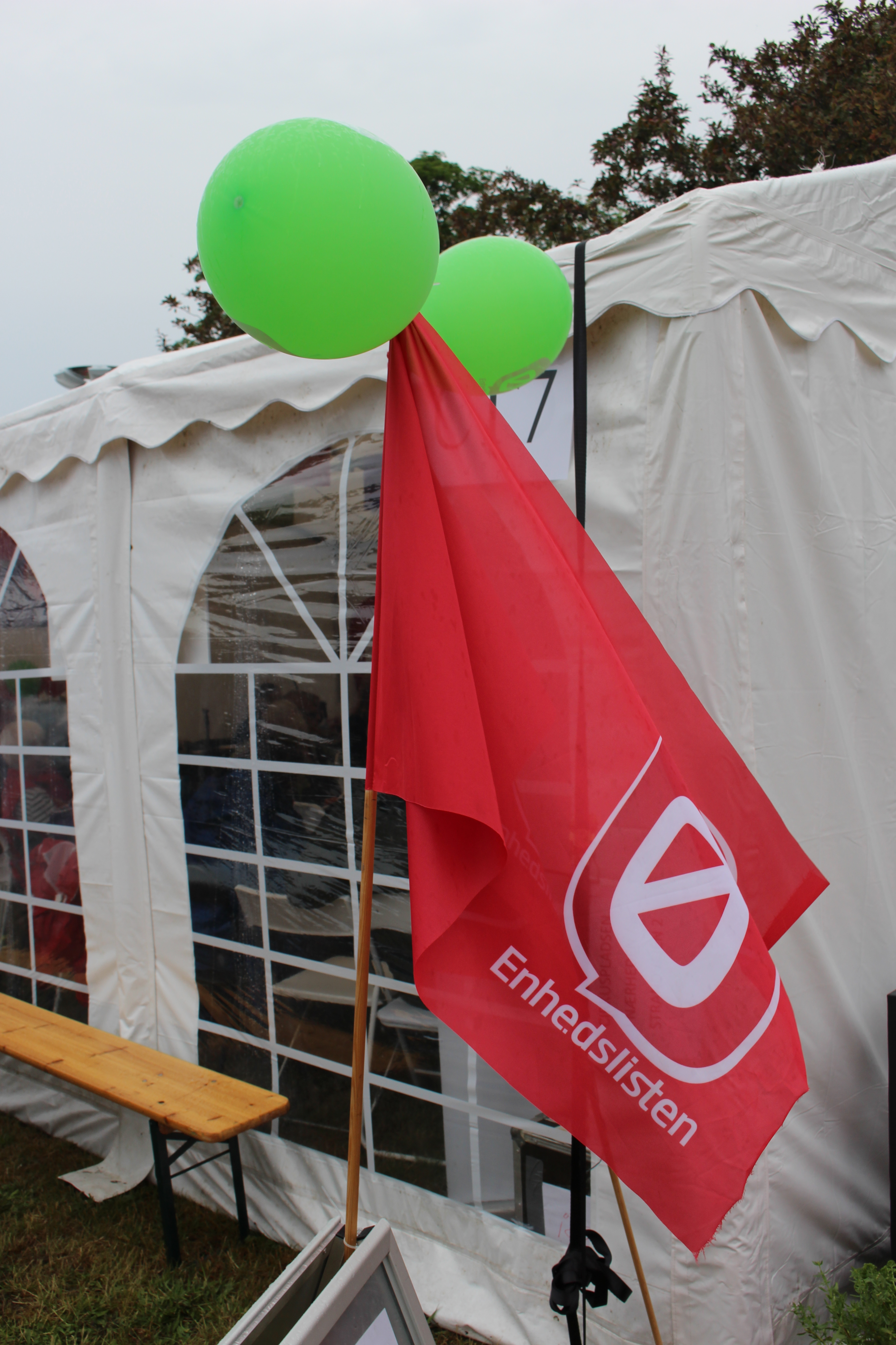 Flag uden for Enhedslistens telt på Folkemødet 2016.